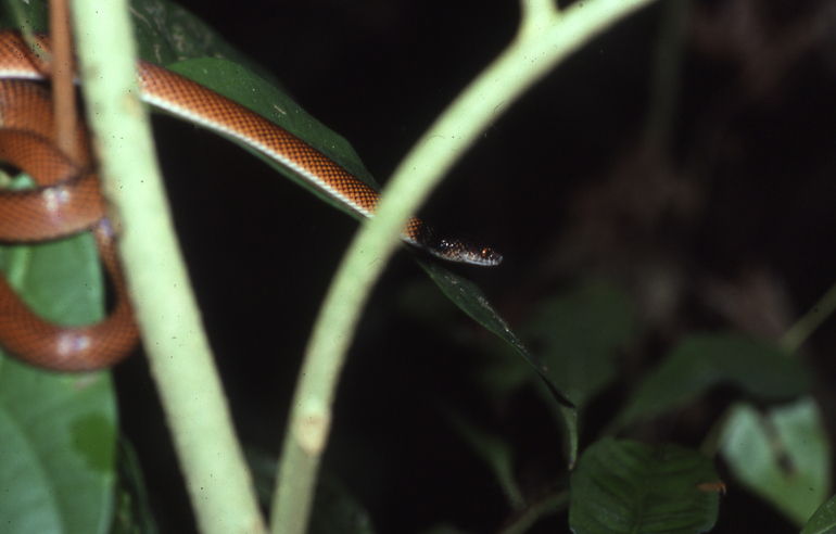 Juvenile of Clelia clelia.